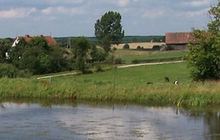 Popioły (woj. warmińsko-mazurskie).